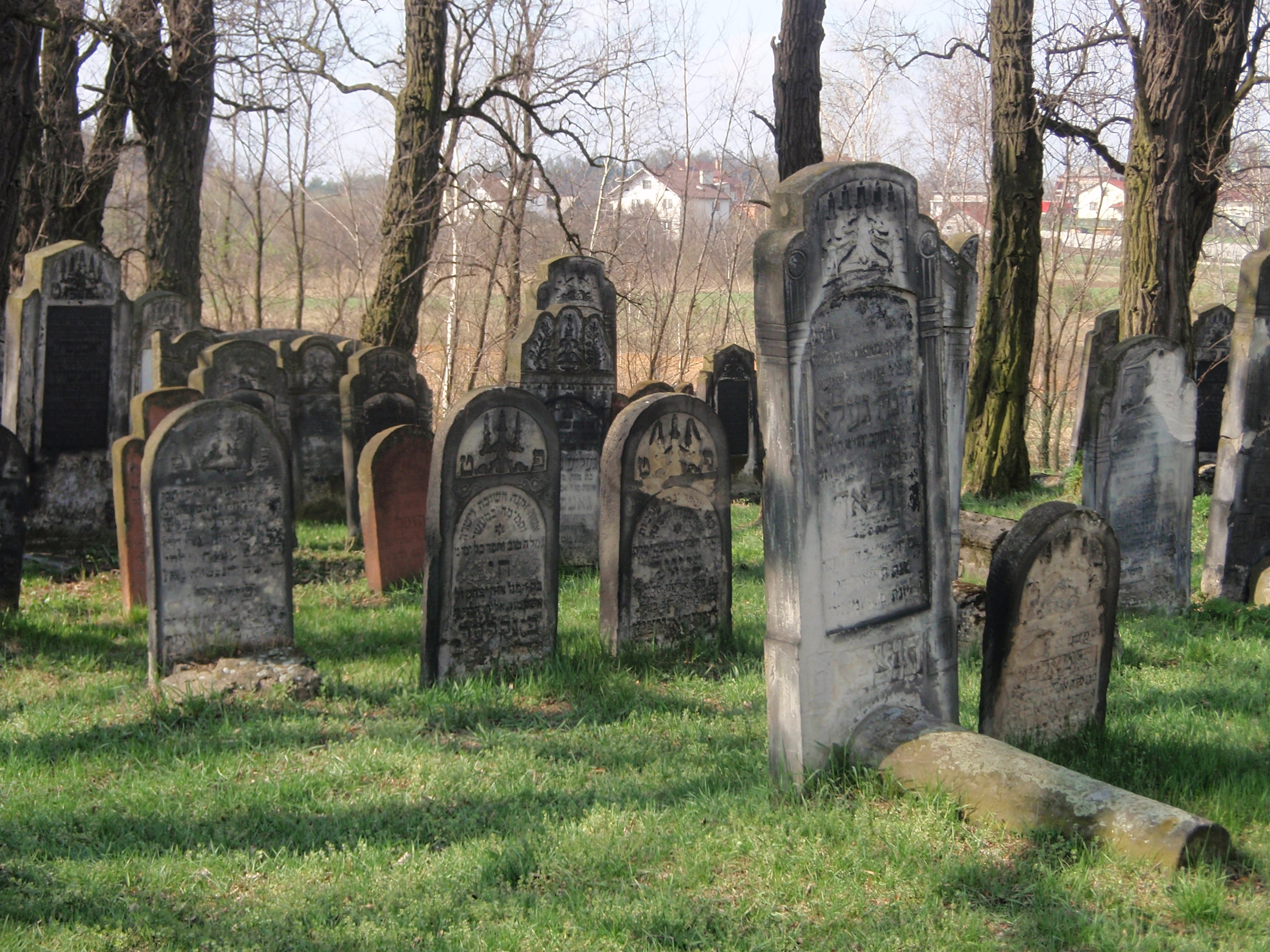 Cmentarz żydowski w Sławkowie (woj. śląskie)